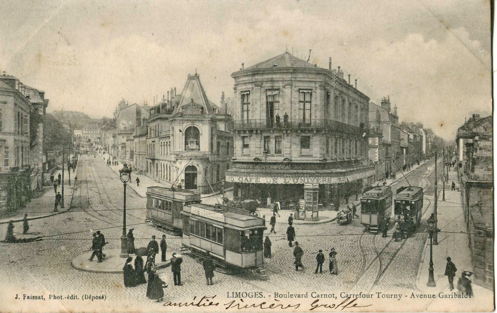 Carte postale ancienne éditée par J. Faissat : LIMOGES - Boulevard Carnot, Carrefour Tourny - avenue Garibaldi